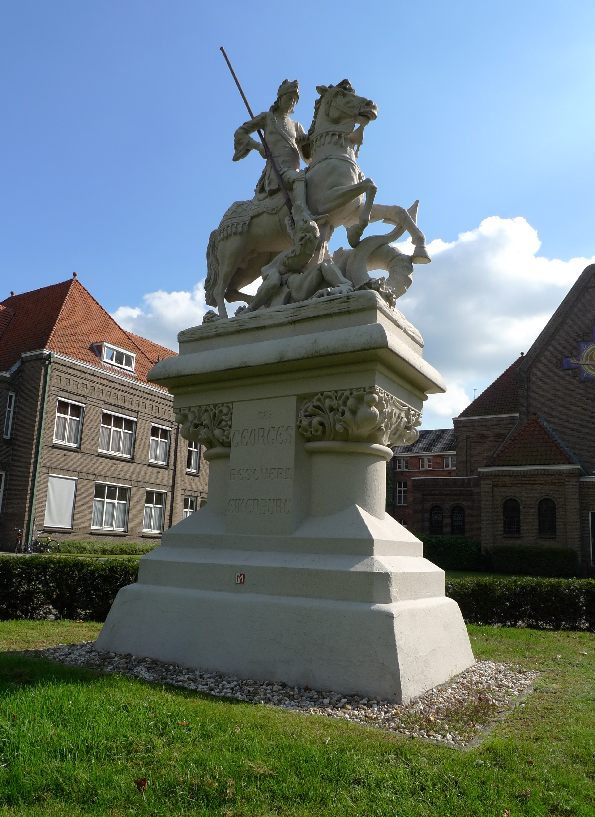 Ruiterstandbeeld Sint-Joris bij Eikenburg in Eindhoven. Nederlands rijksmonument nr. 518708